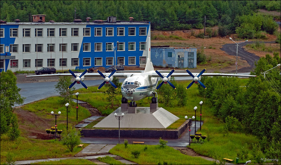 Самолёт-памятник АН-12 провожает и встречает земляков и гостей города Магадана и Магаданской области!